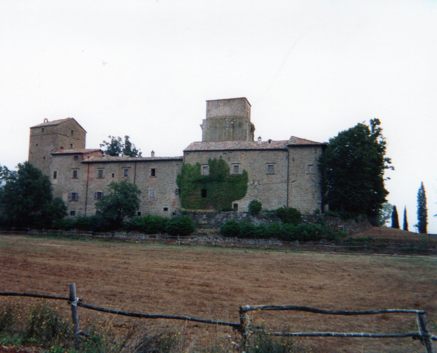 veduta del castello Bourbon di Petrella (PG)